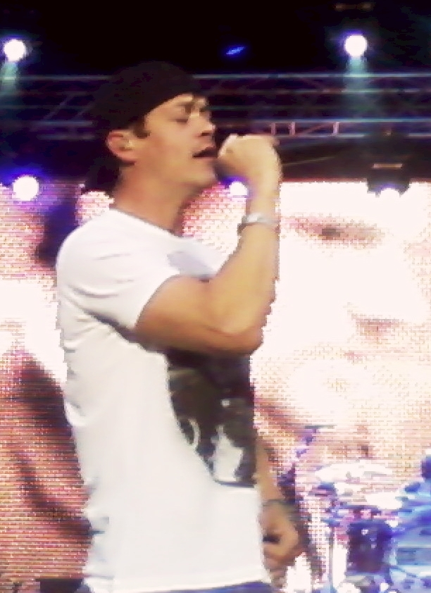 Brad Arnold von 3 Doors Down auf der Freilichtbühne des Hamburger Stadtparks